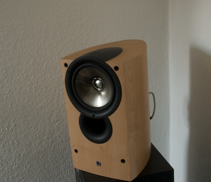 KEF iQ1 speakers